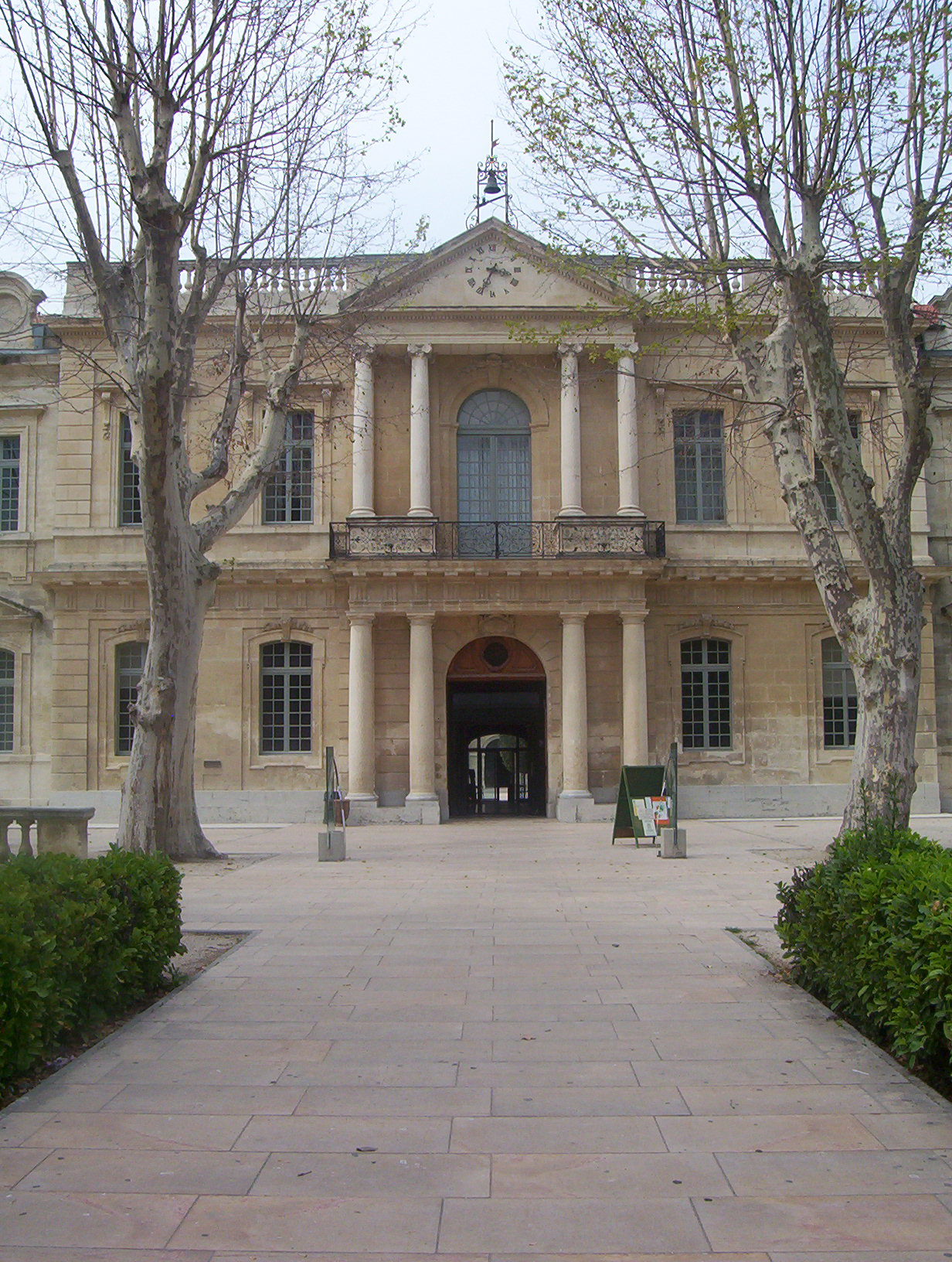 Université d'Avignon et des Pays de Vaucluse, France : Site Sainte-Marthe, Entrée principale.